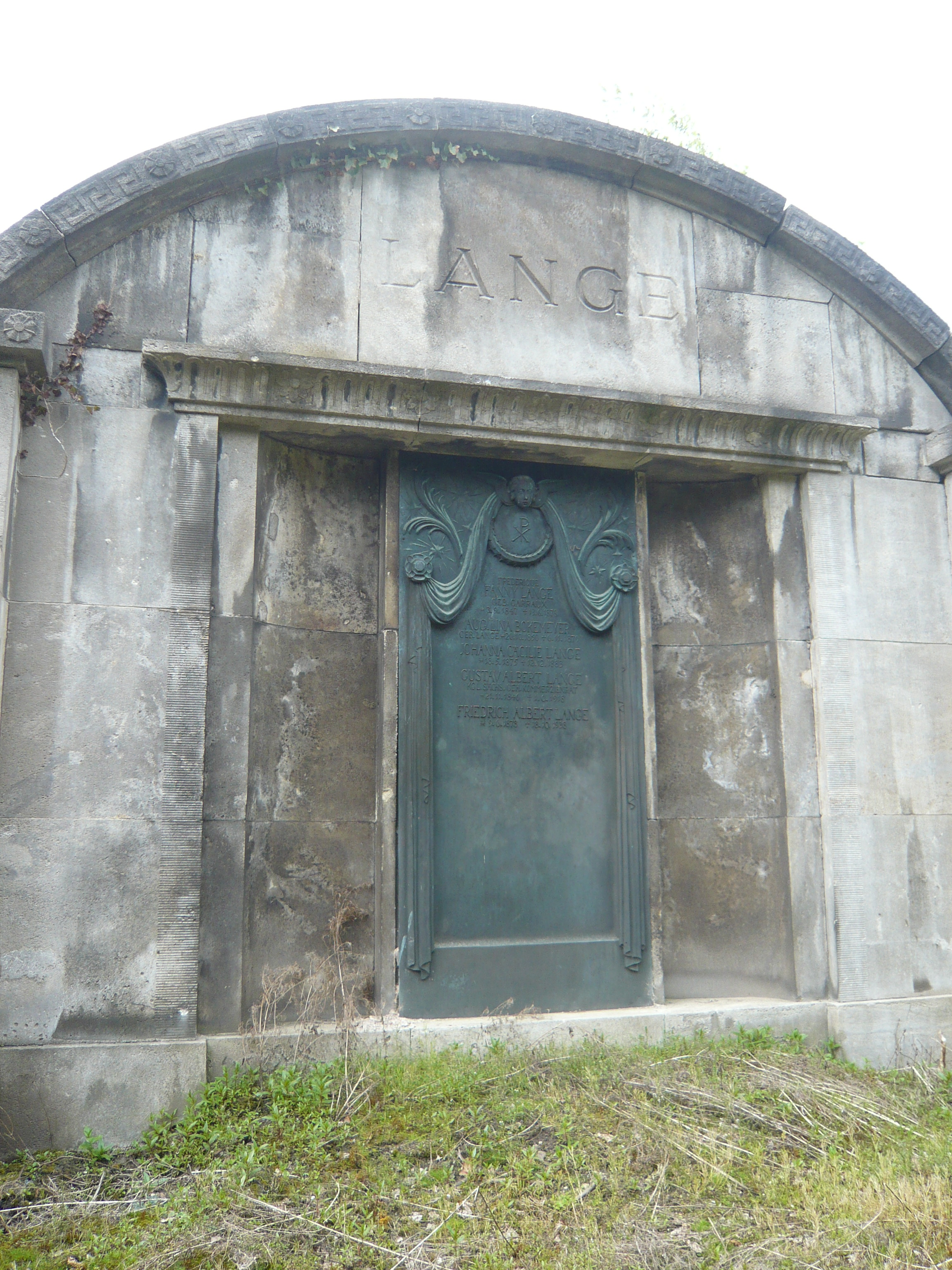 Grabmal der Unternehmerfamilie in Aue